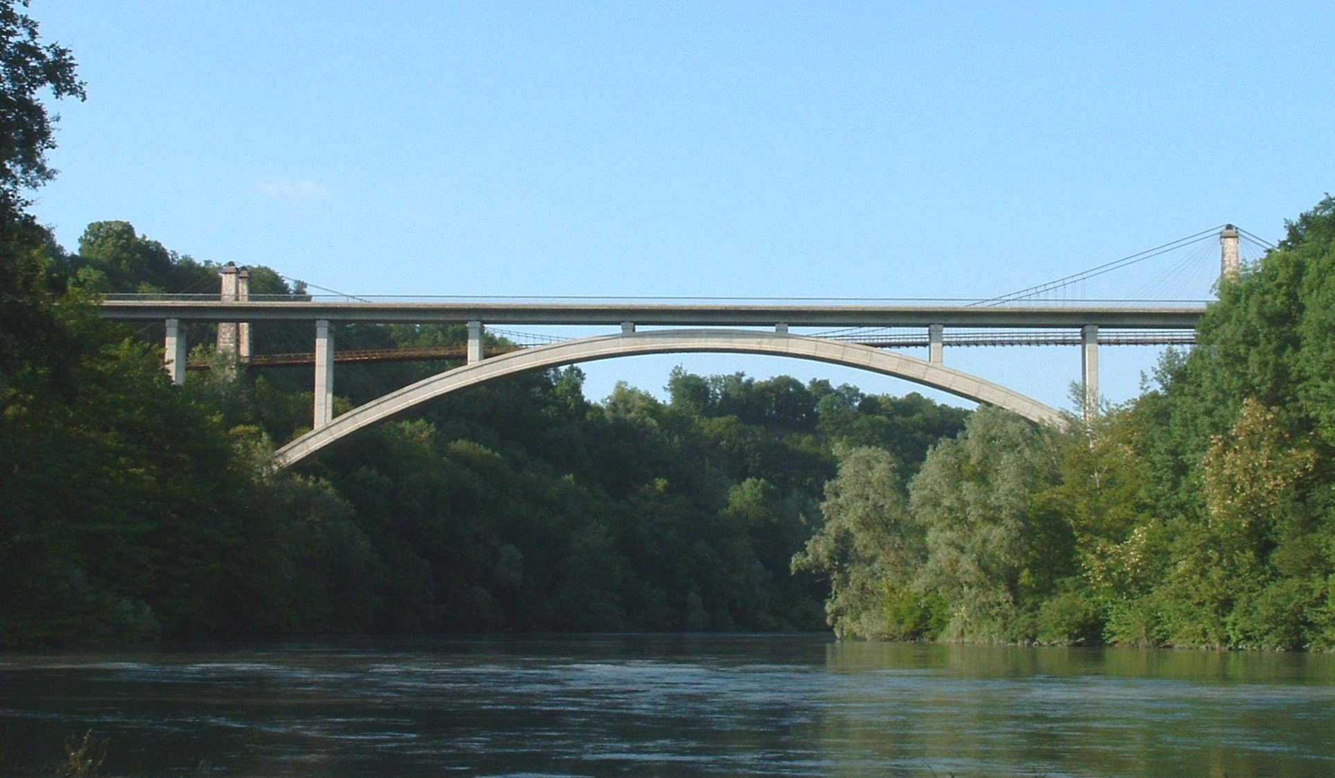 Vinay - Pont de Trellins terminé franchissant l'Isère